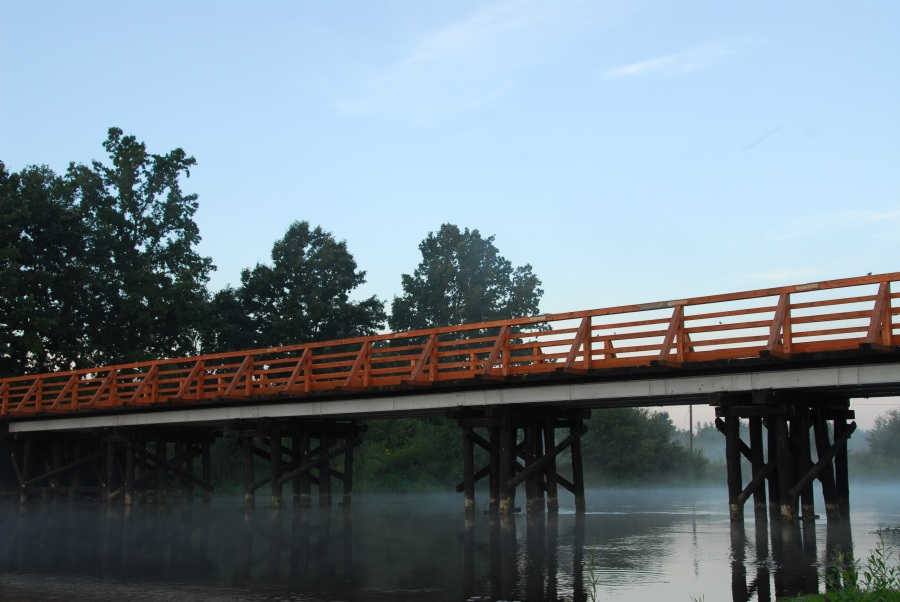 Drewniany most na rzece Warcie nieopodal Łążka